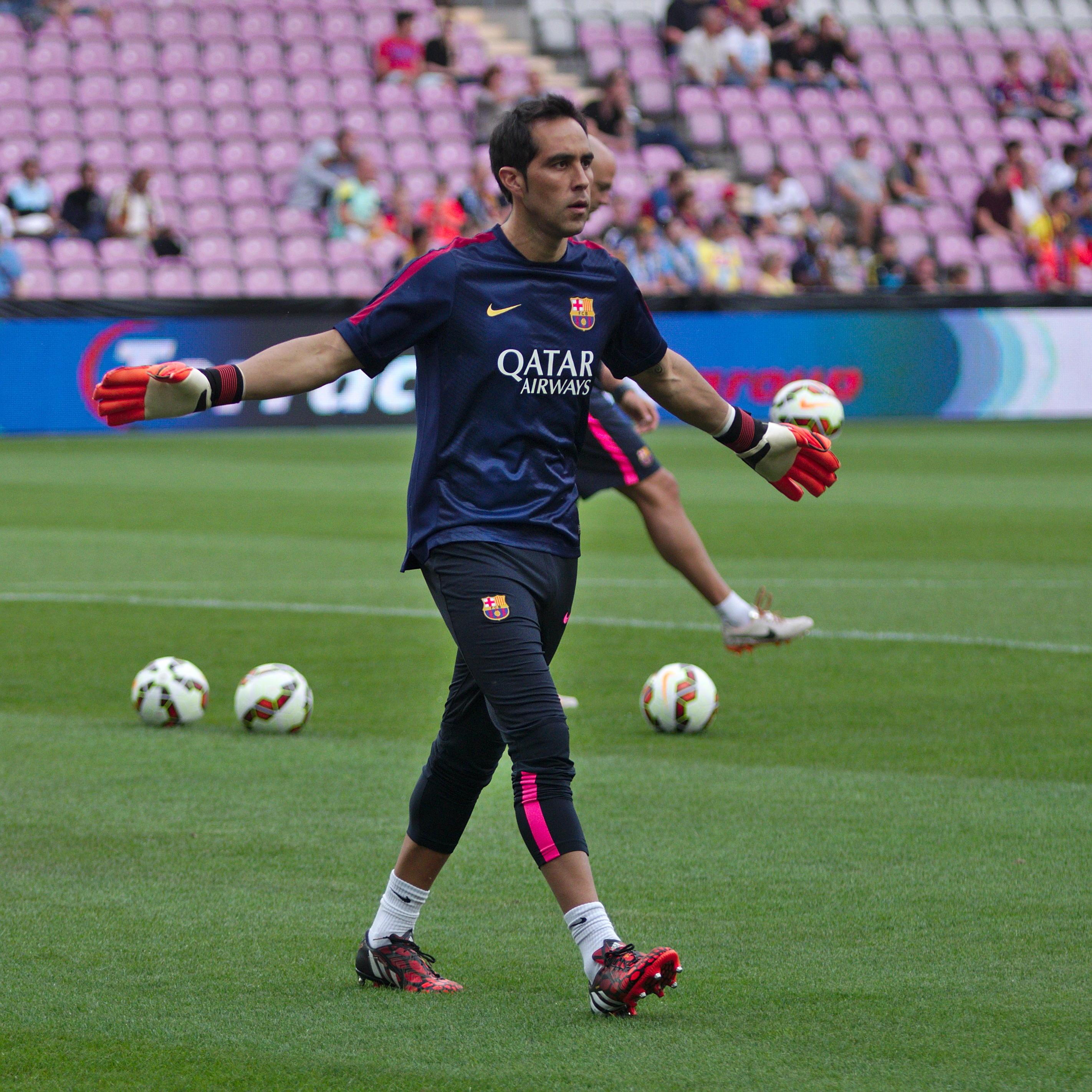 Barça - Napoli - 20140806 - Claudio Bravo